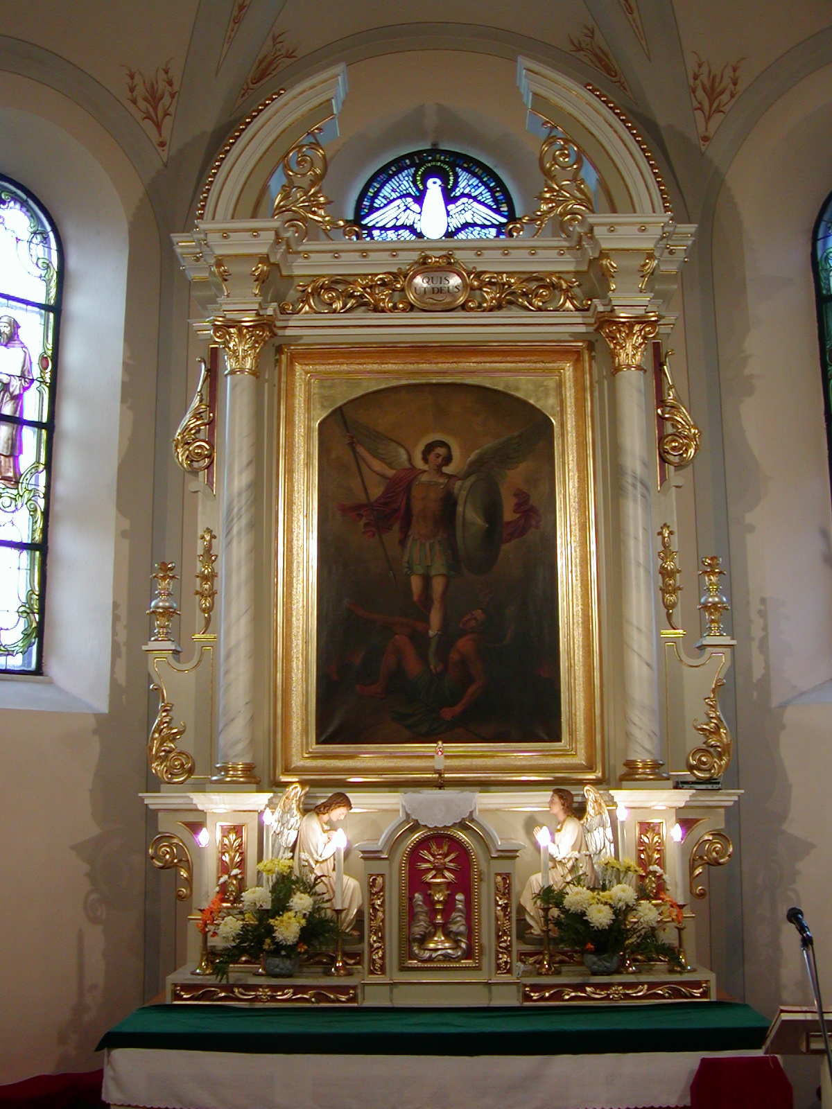 Hlavný oltár Kostola svätého Michala z obrazom sv. Michala